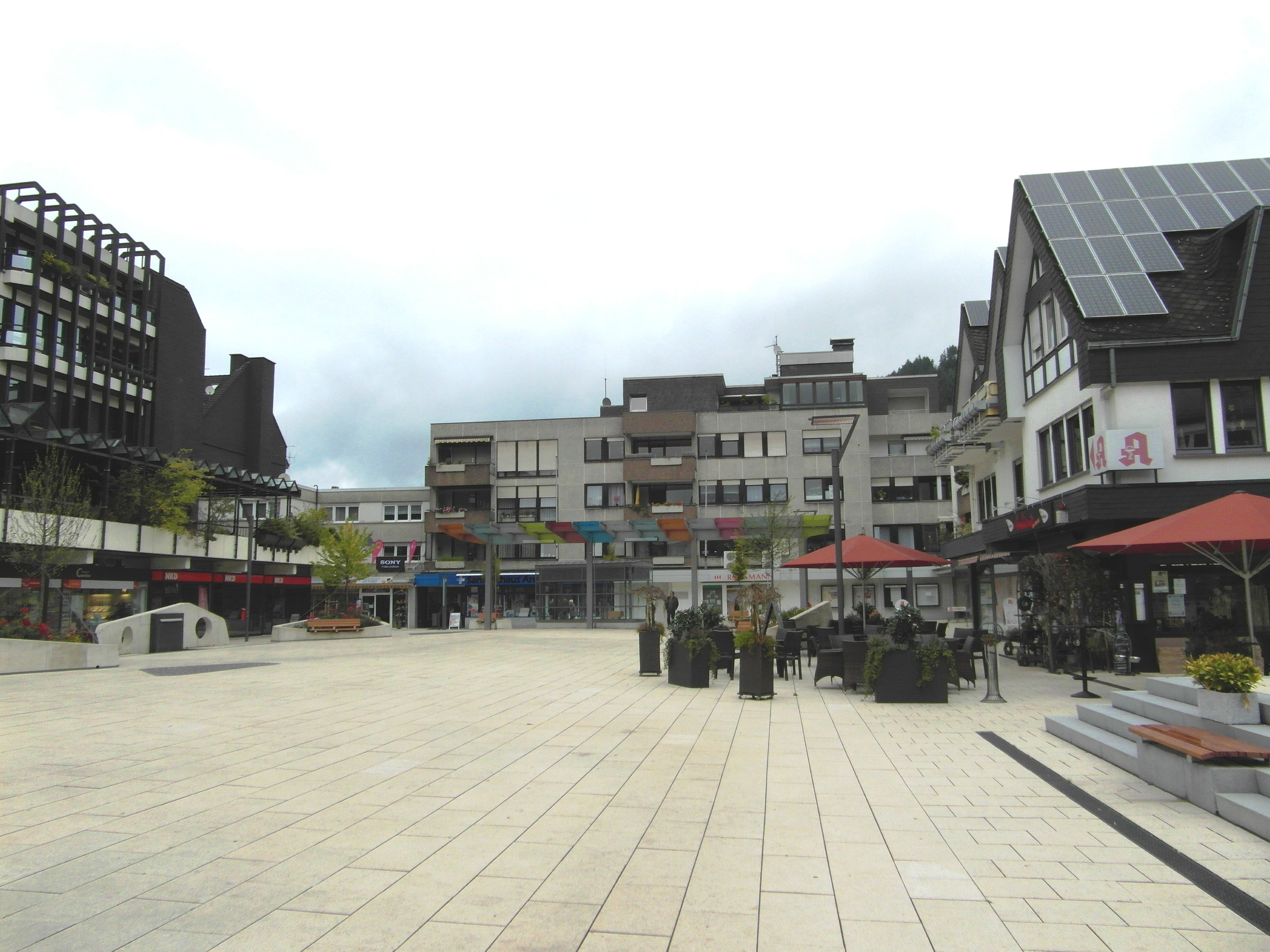 im Jahr 2013-14 erneuerter Marktplatz in Altenhundem